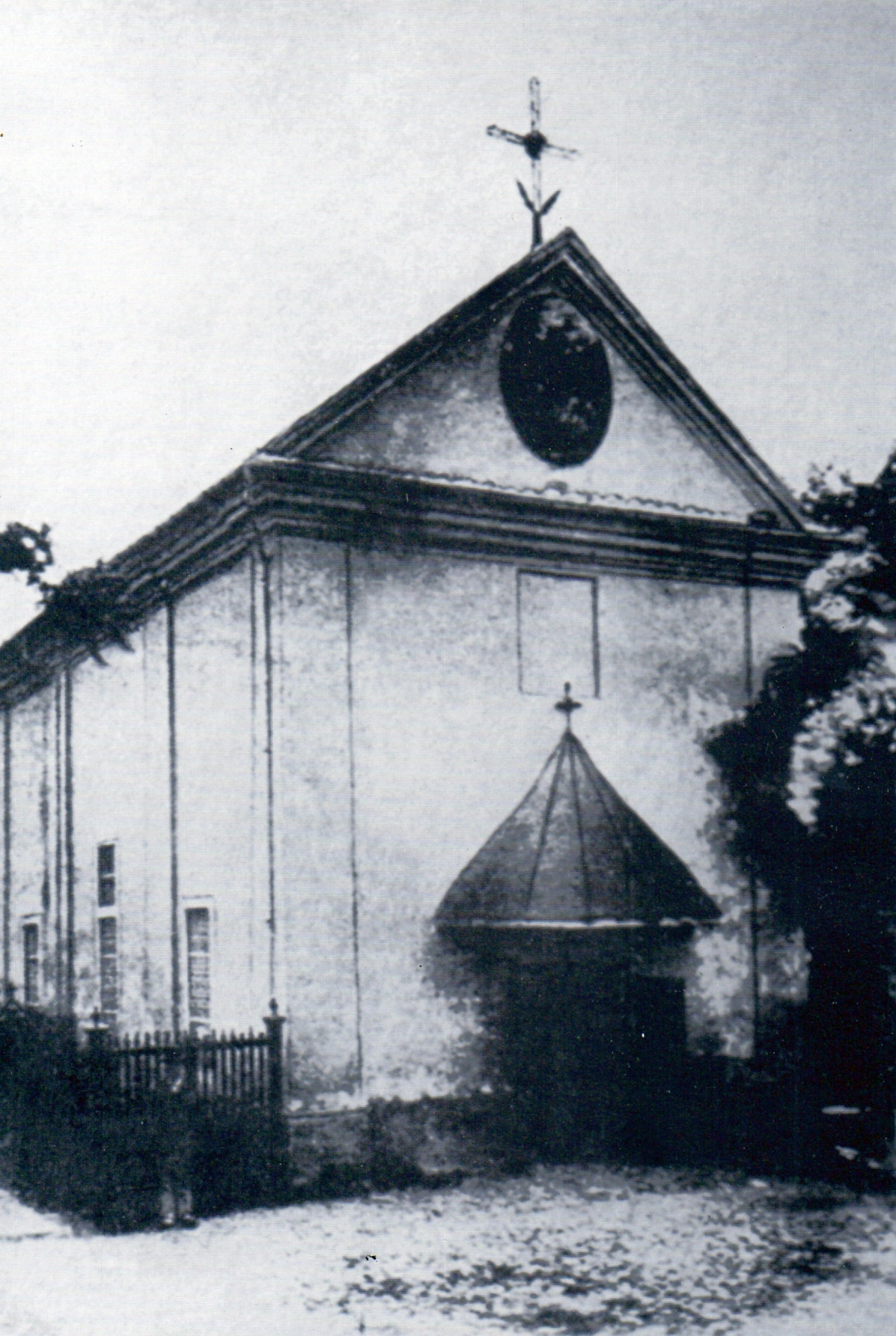 Biserica Sfântul Ilie din Craiova demolată în anul 1890